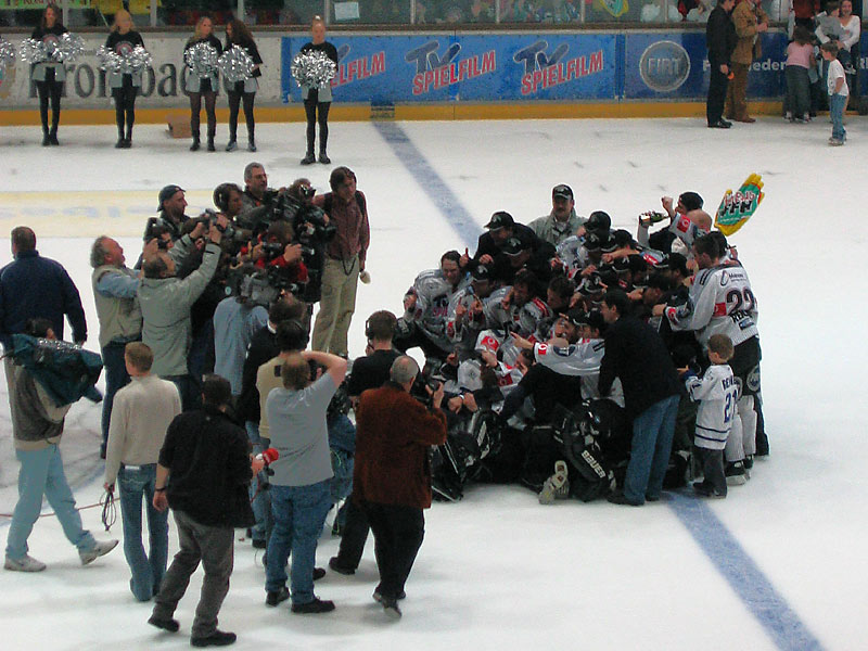 Die Frankfurt Lions nach dem Gewinn der Deutschen Meisterschaft (4. Finalspiel) gegen die Eisbären Berlin am 16.04.2004 in der Eissporthalle Frankfurt